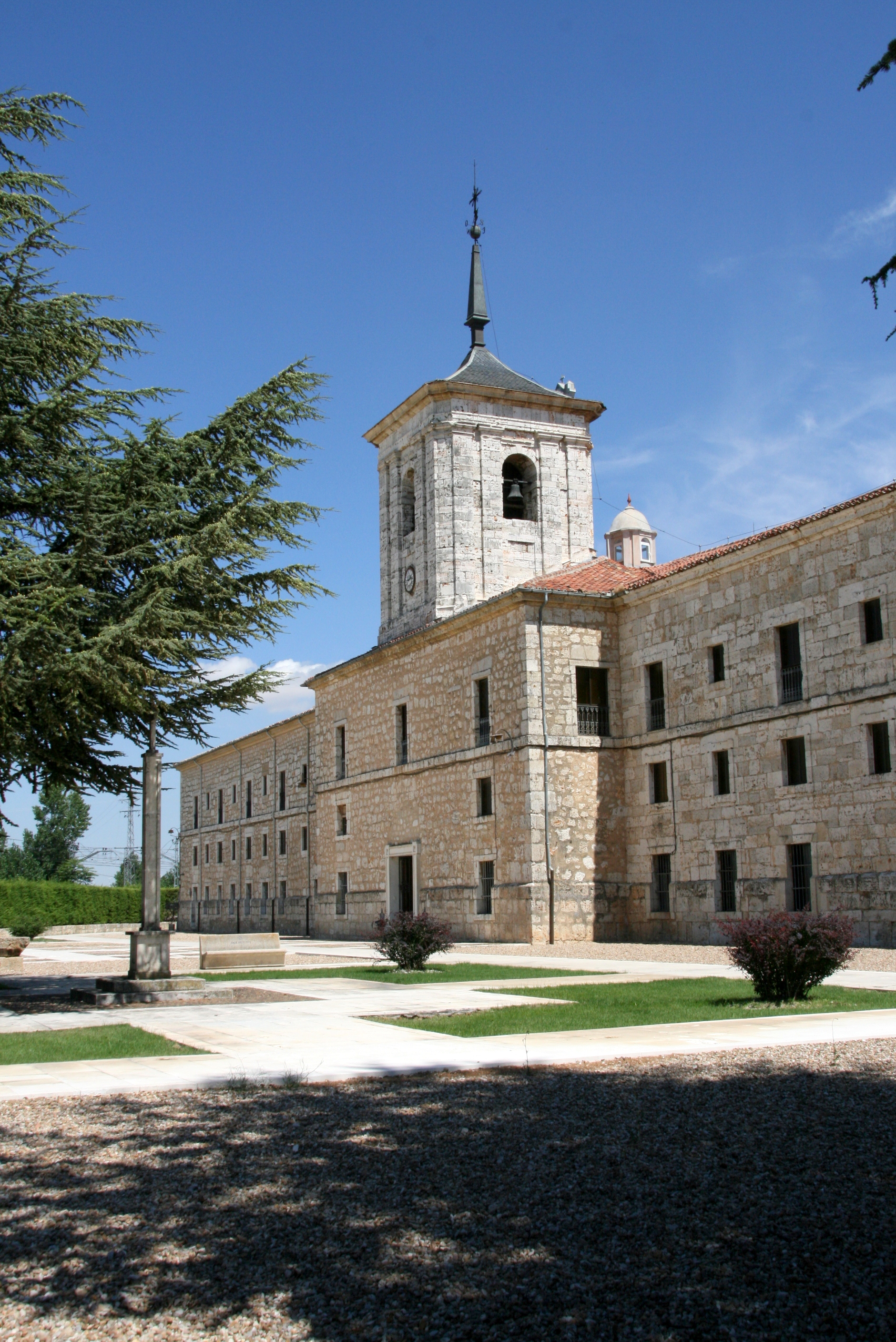 Fachada principal del monasterio de San Isidro de Dueñas